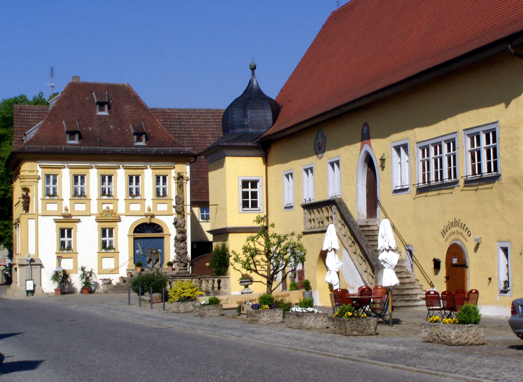 Dorfensemble Frickenhausen/Main: spätgotisches Rathaus mit barockem Haus Hufnagel